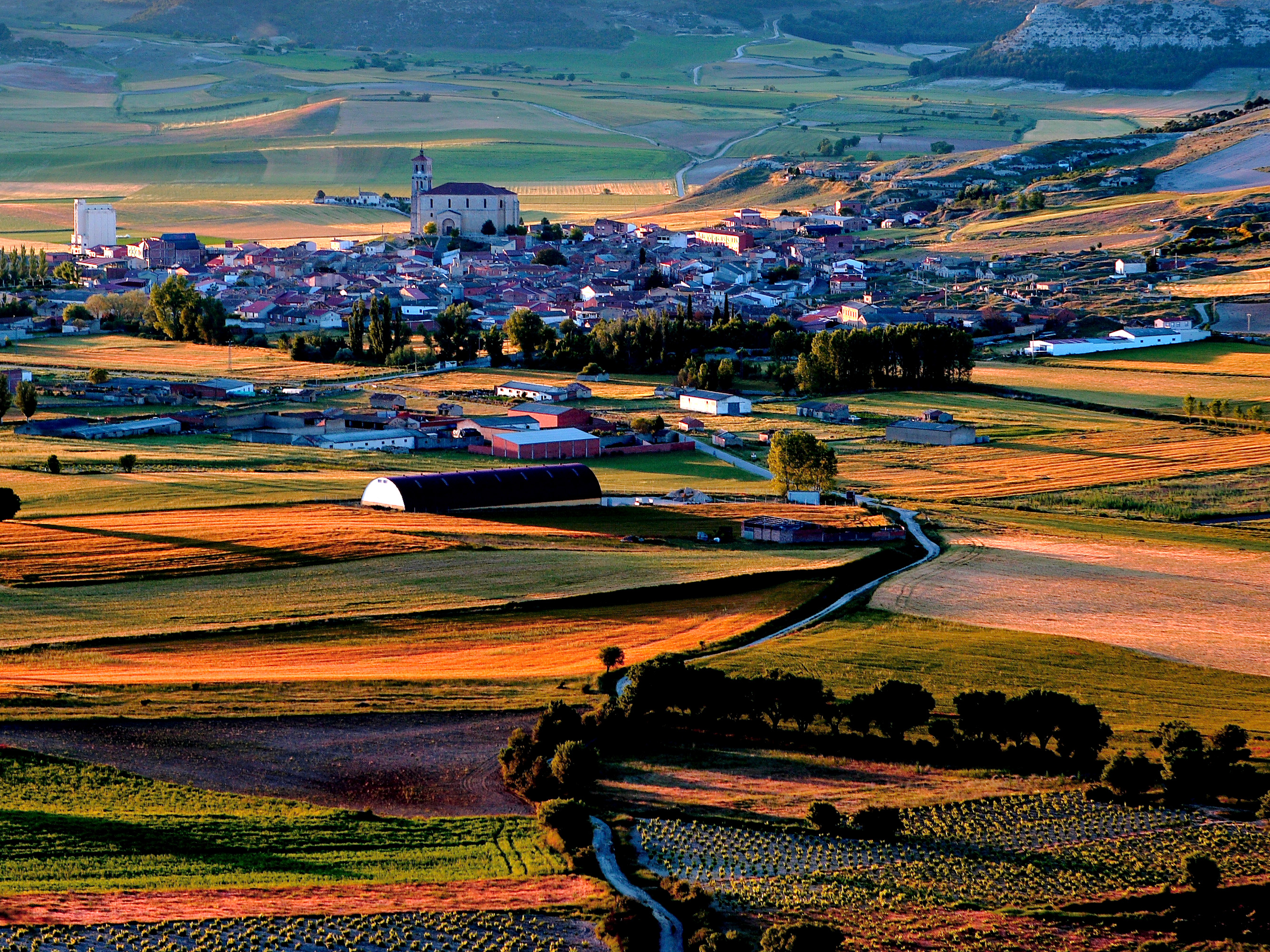 Vista de la localidad de Cevico de la Torre, en Palencia (España)